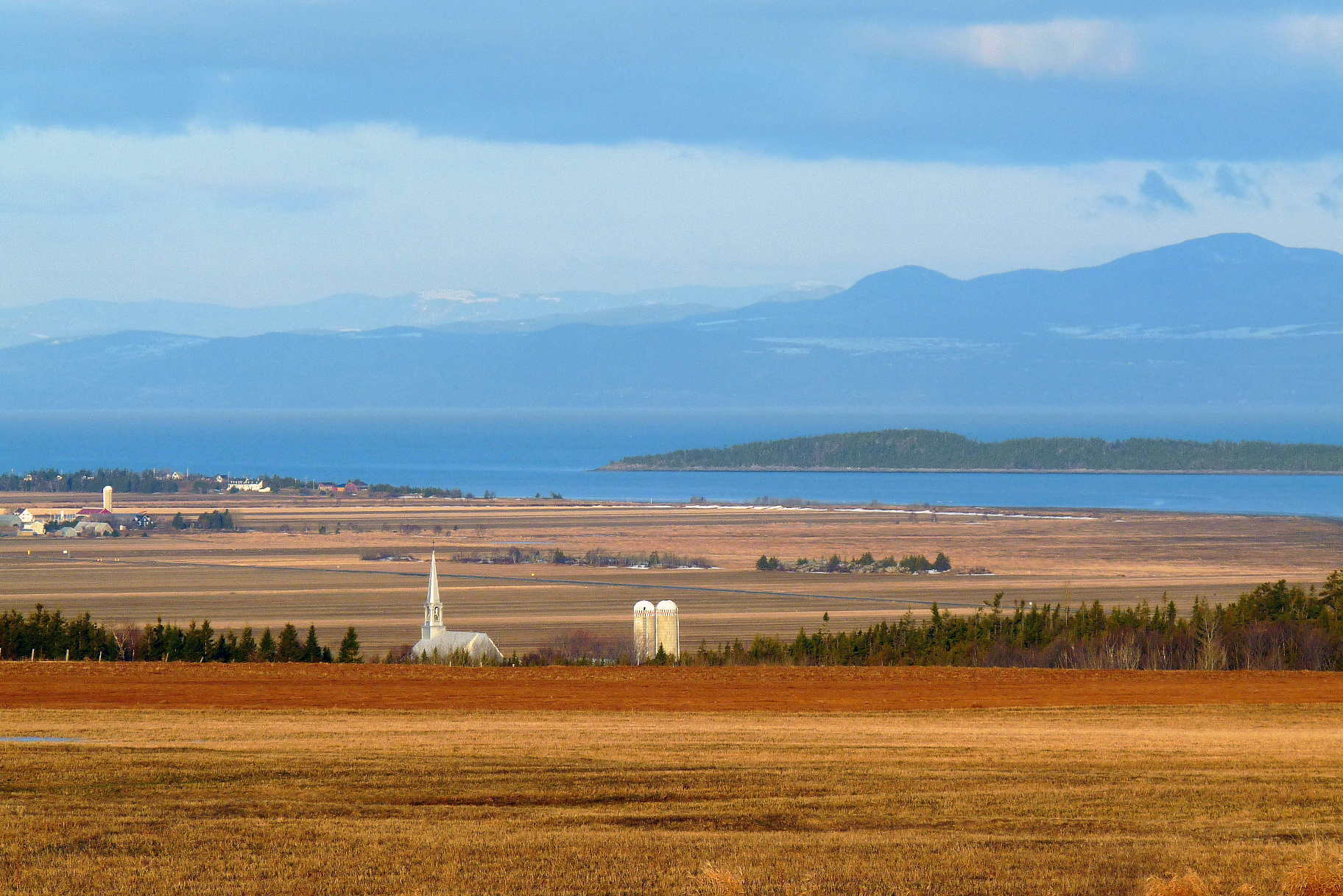 Église de saint-Germain au Kamouraska (Québec) avec, en arrière plan, le fleuve Saint-Laurent et la région de Charlevoix